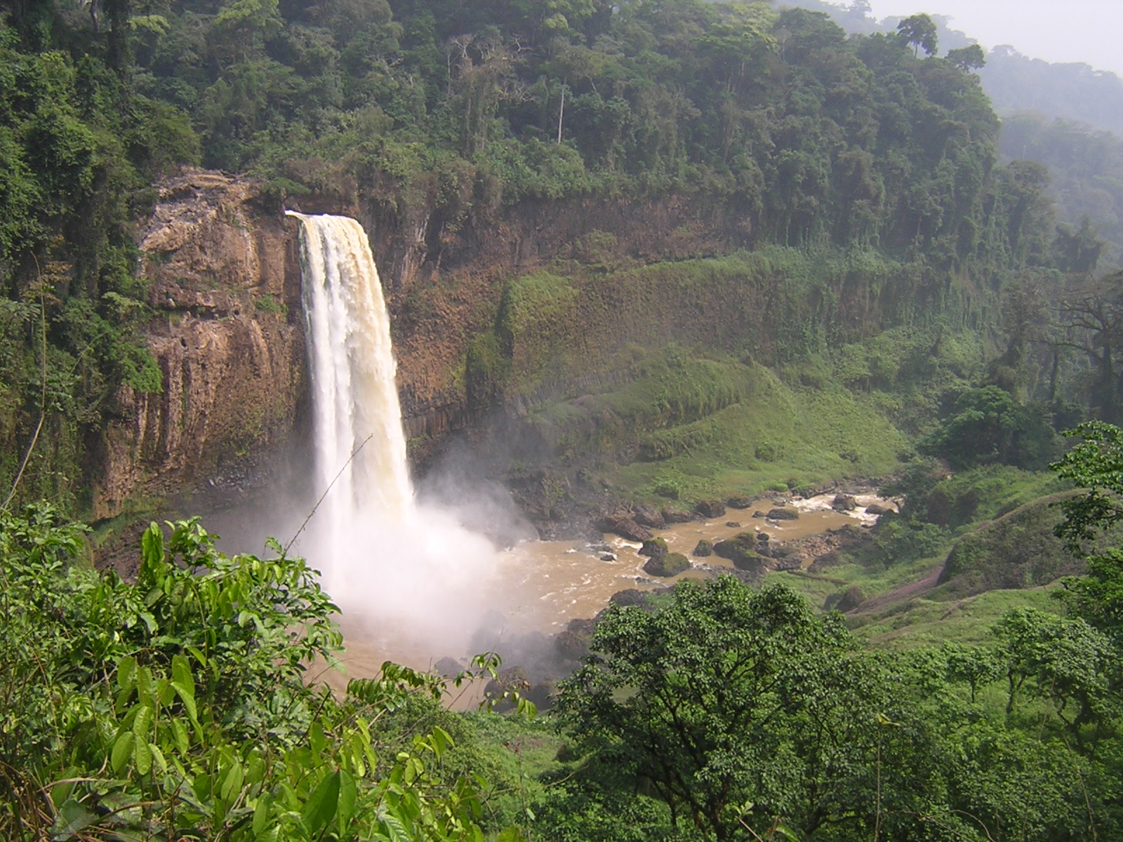 Les chutes d'eau d'Ekom Nkam, dans le département du Littoral au Cameroun